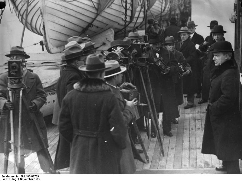 Der Sohn des amerikanische Grossindustriellen John D. Rockefeller in London! John D. Rockefeller, der Sohn des amerikanischen Gross-Industriellen, hat sich auf dem Dampfer "Mauretania" nach London begeben. Unser Bild zeigt ihn bei seiner Ankunft in Southhampton umgeben von Photo- und Kino-Operateure.